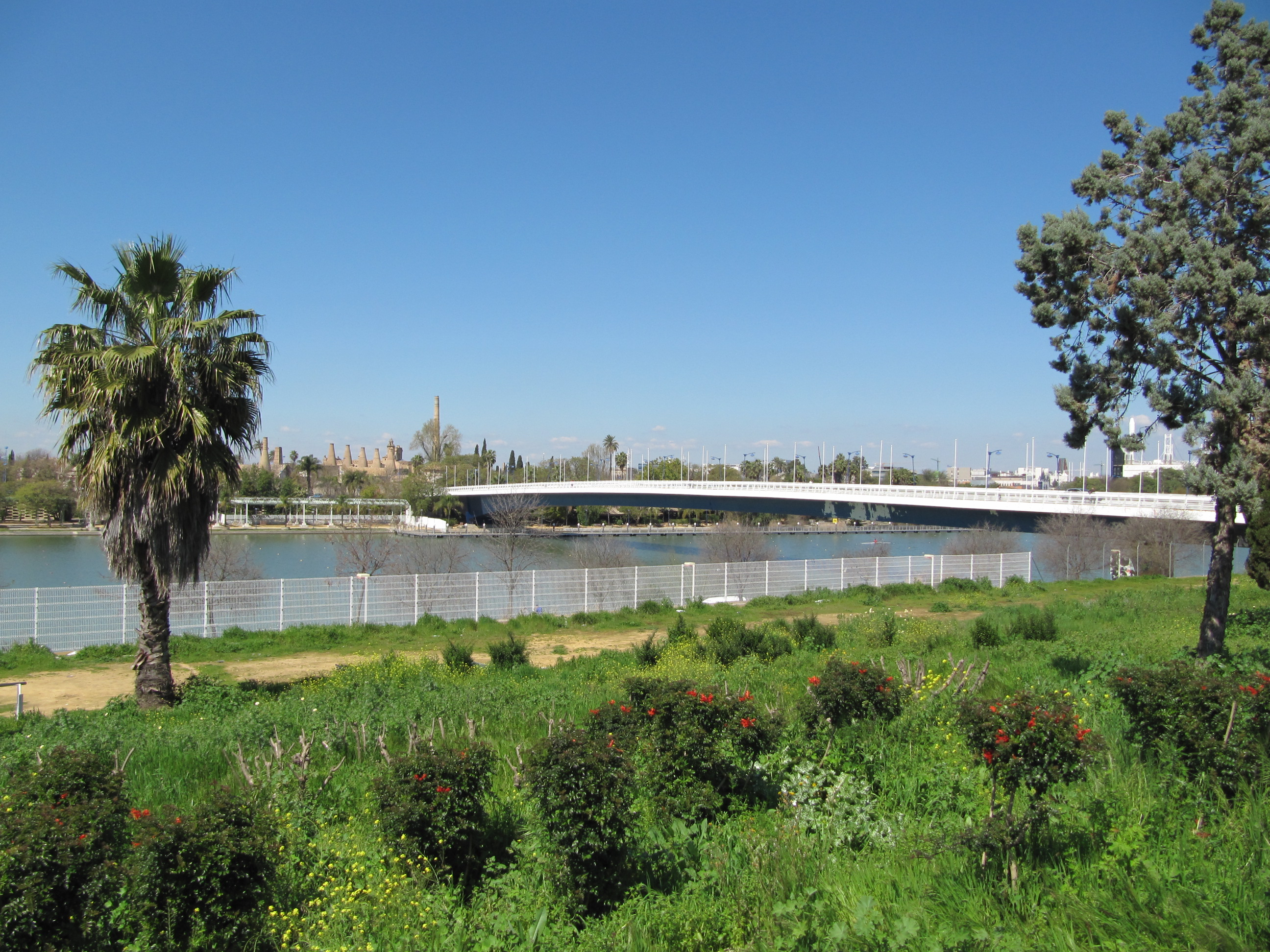 Sevilla - March 2011 - 097.jpg